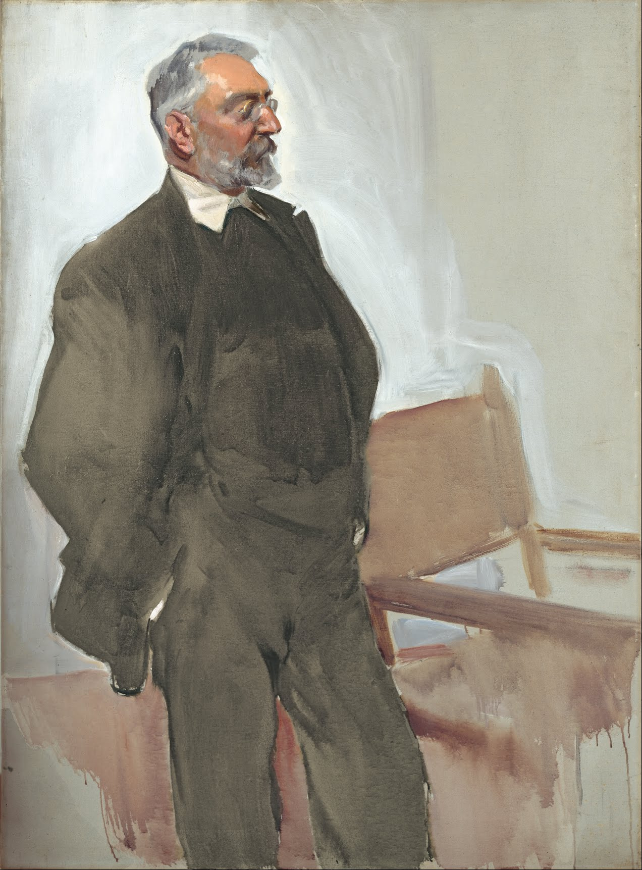 Retrato del escritor y filósofo español Miguel de Unamuno (1864-1936).